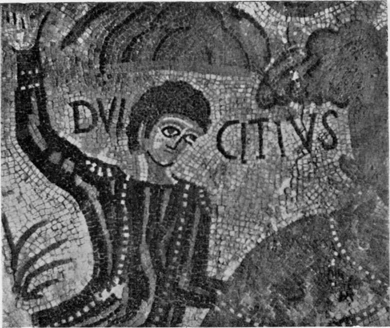 dulcitius